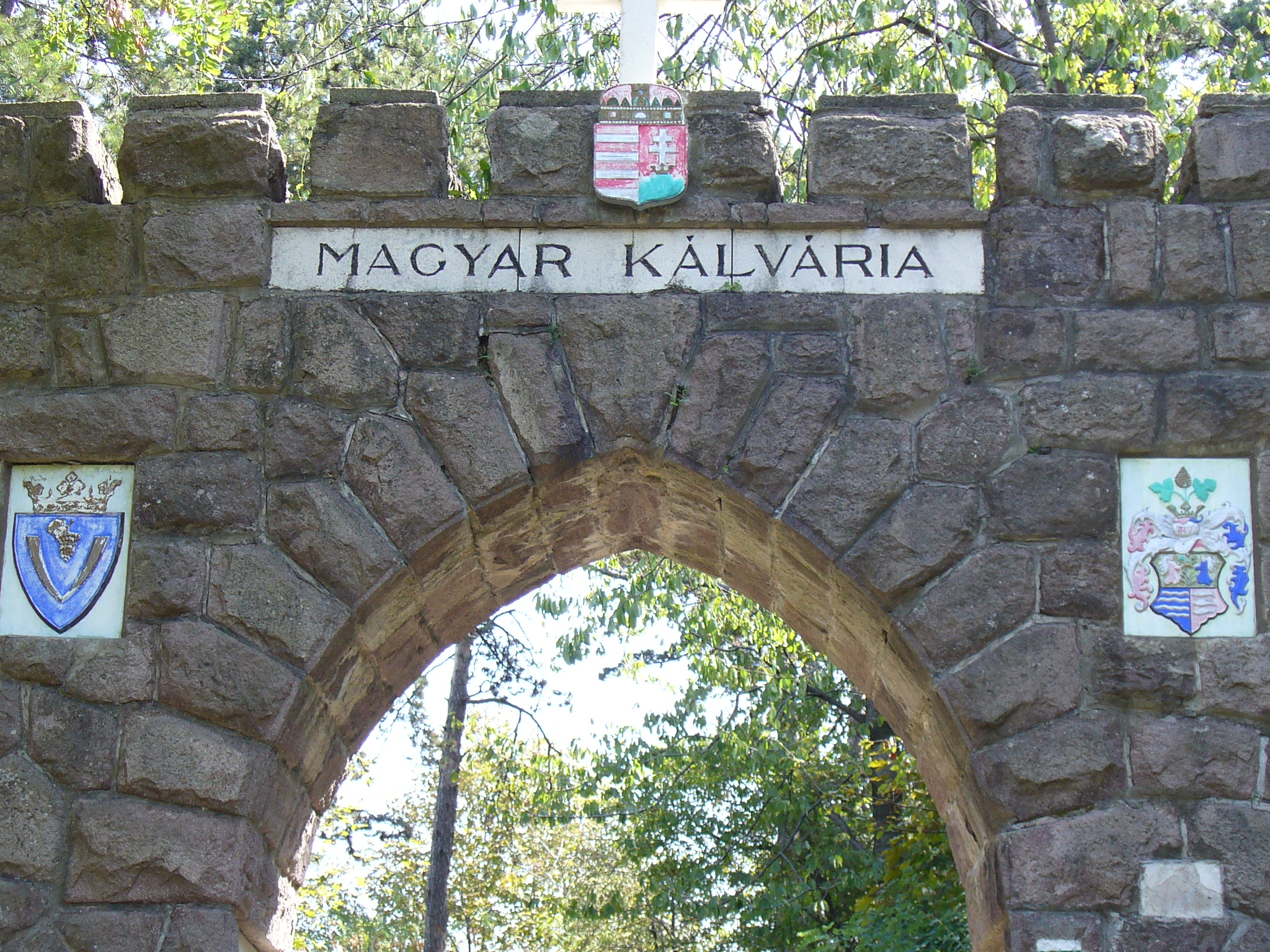 Magyar kalvaria in Sátoraljaújhely. Main gate